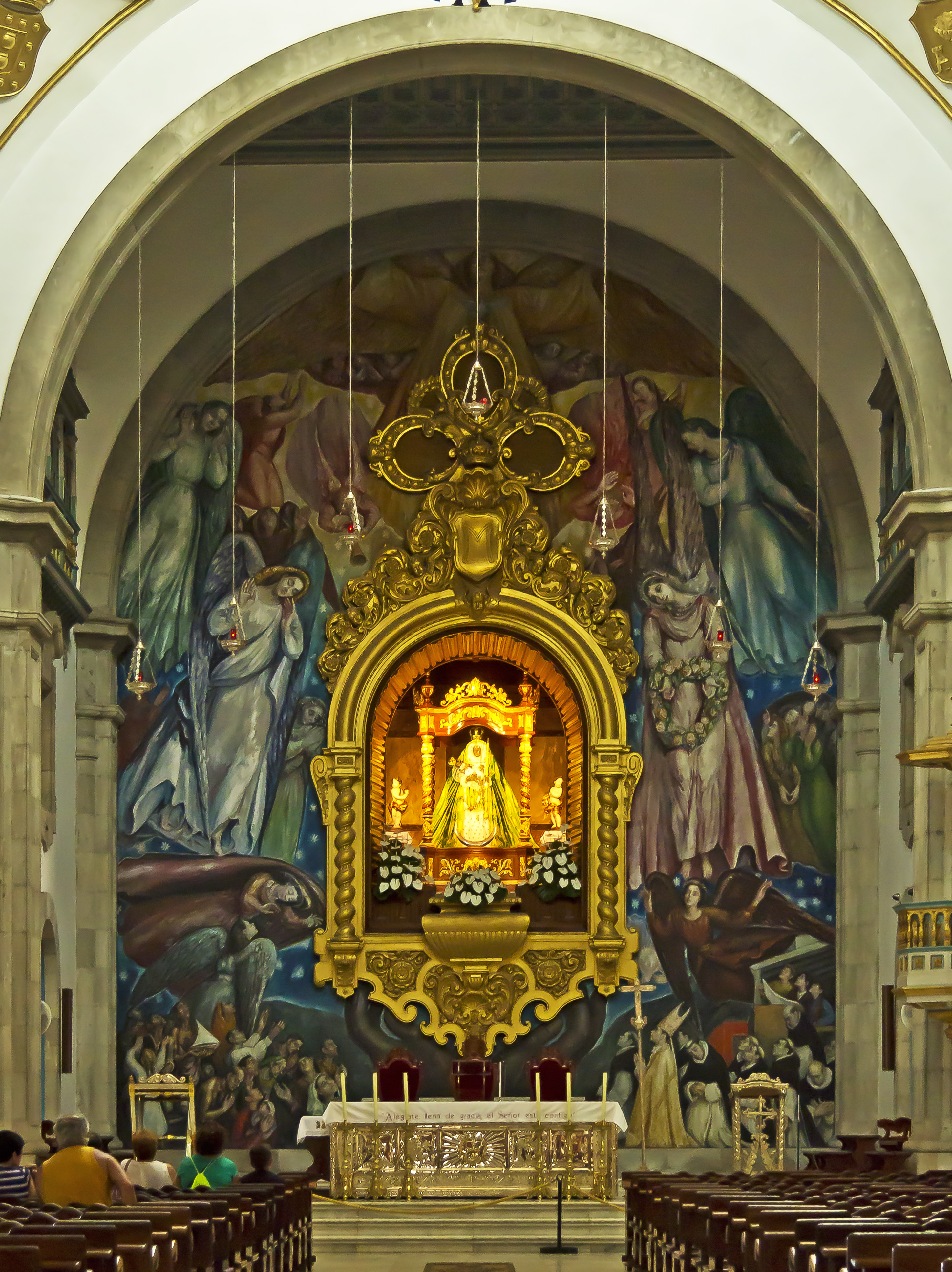 Basilika de Nuestra Señora de la Candelaria, Blick auf den Hauptaltar